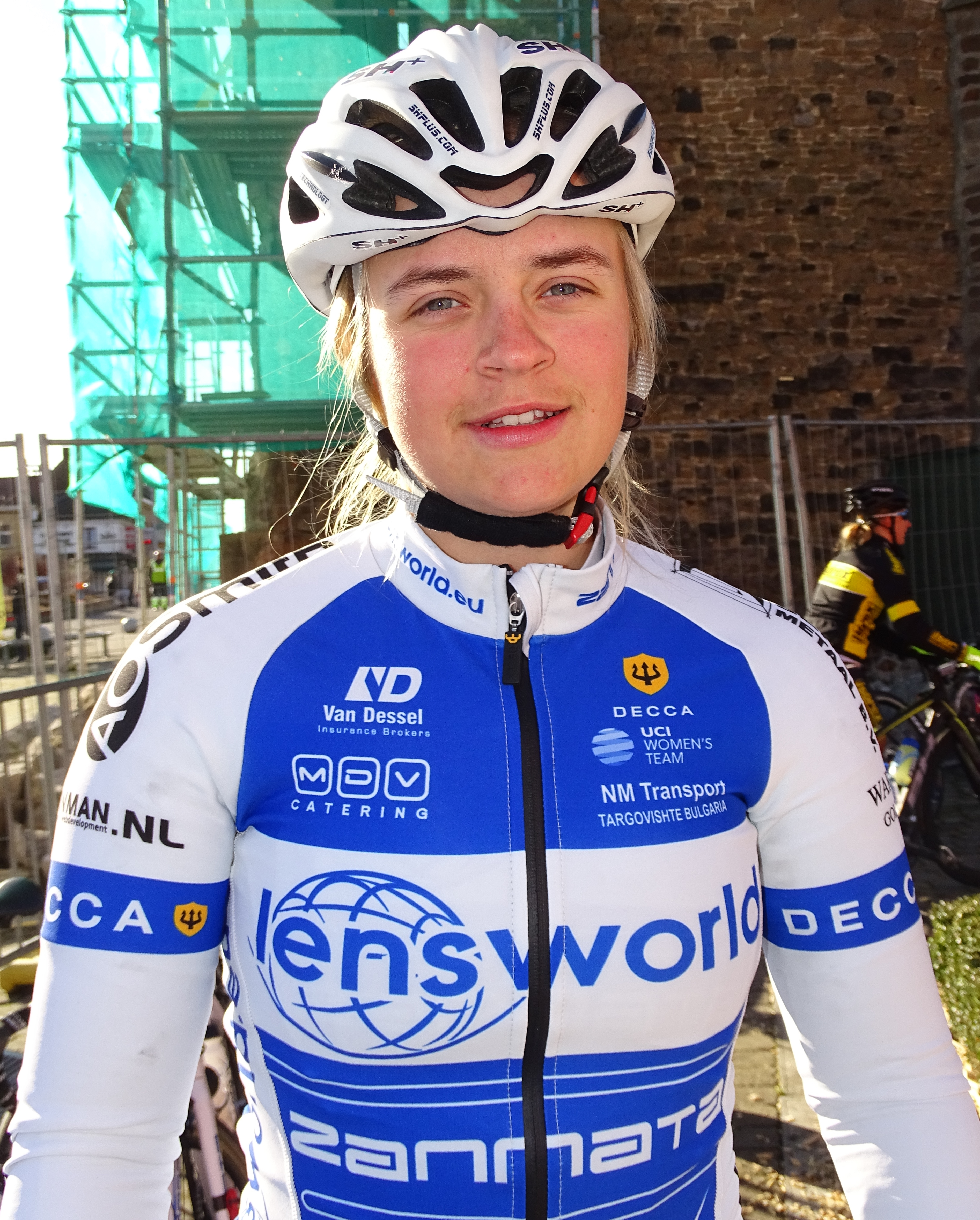 Reportage réalisé le mercredi 2 mars à l'occasion du départ du Samyn des Dames 2016 et du Samyn 2016 à Quaregnon, Belgique.